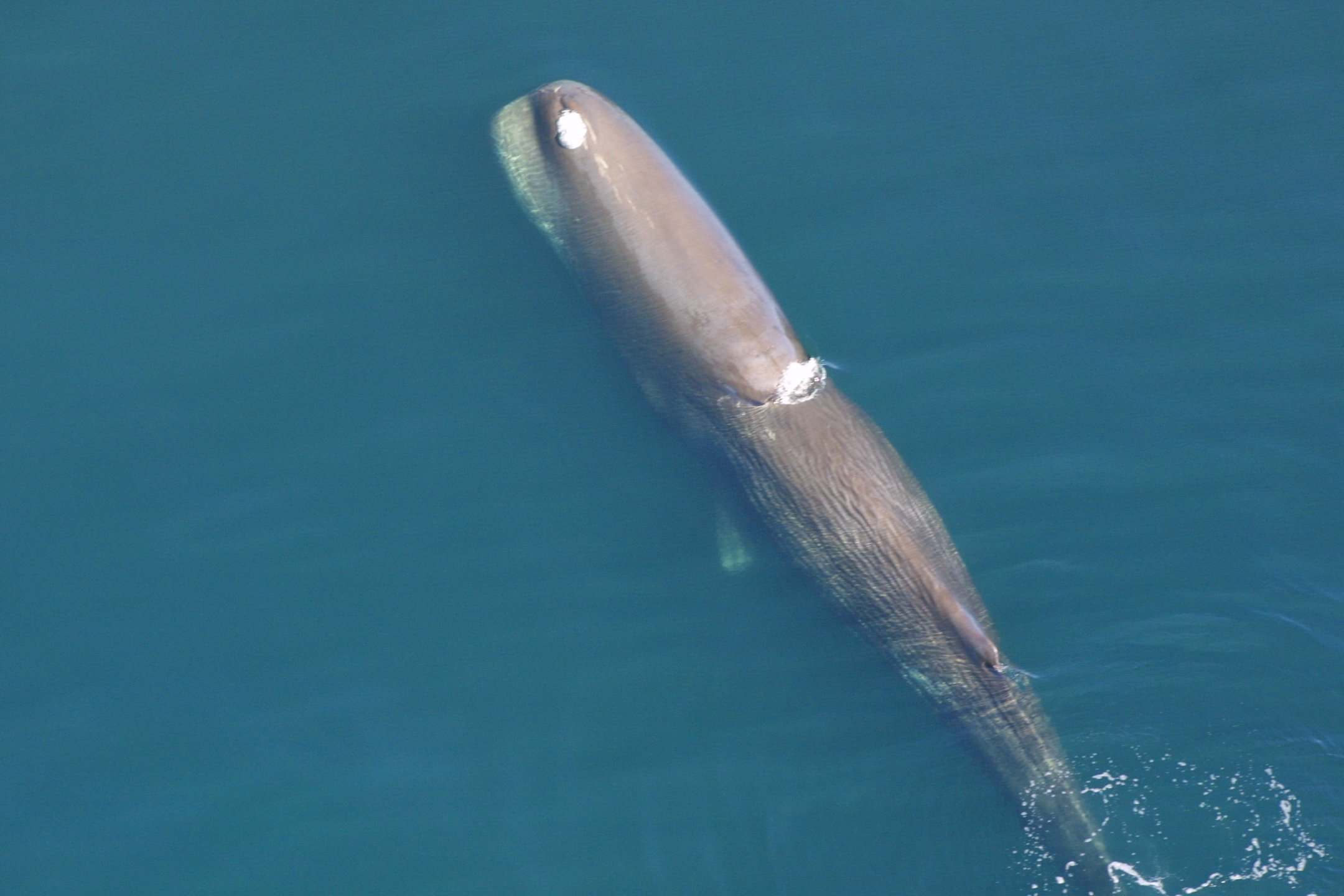 anim1753